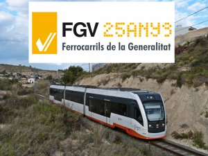 Tten-Tram destino Luceros a su paso por Venta Lanuza